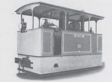 Tram Guidovia Camuna